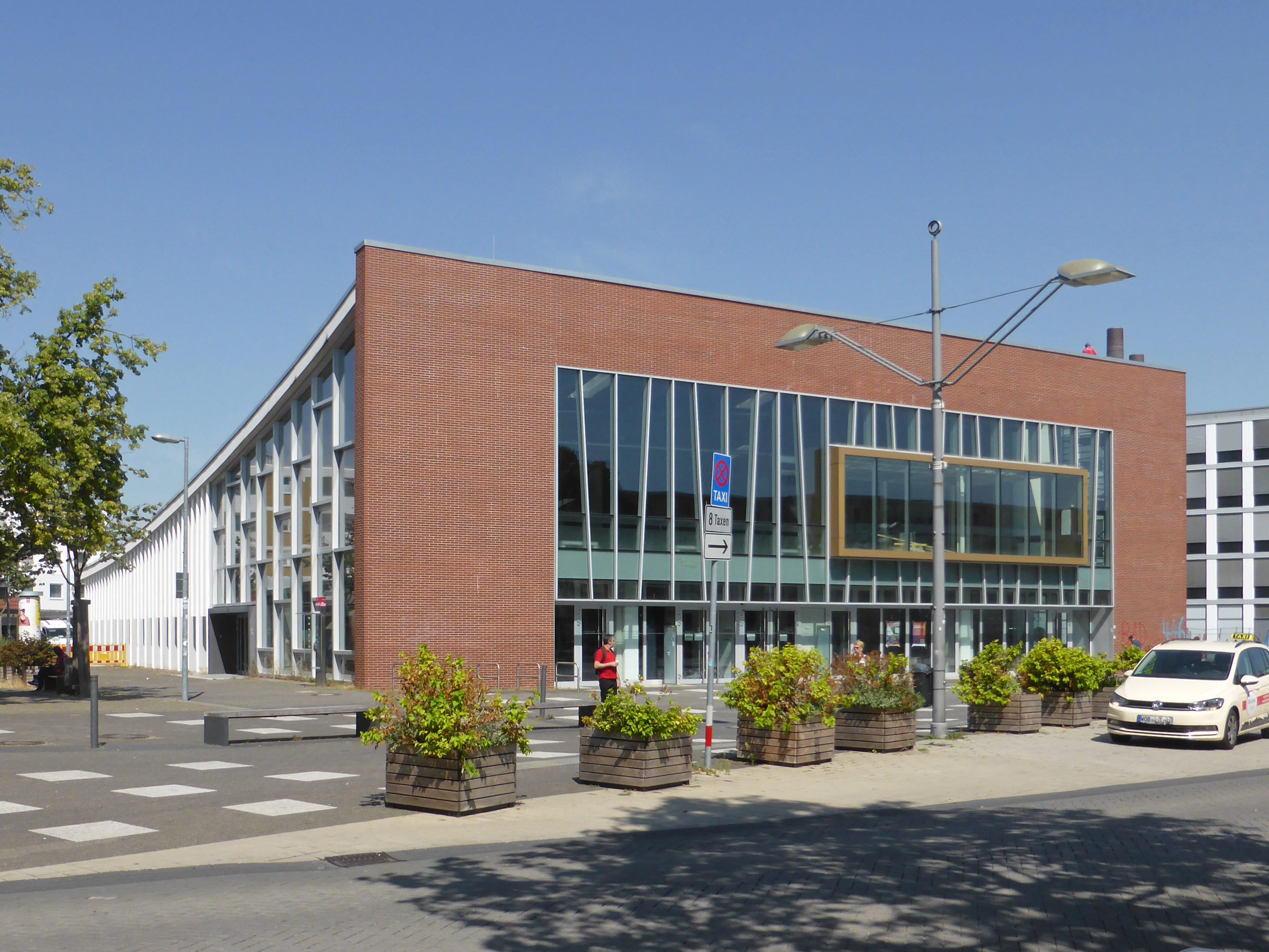 Markthalle in Wolfsburg, ehemals Kaufhausrestaurant und Lebensmittelabteilung des Warenhauses Hertie.